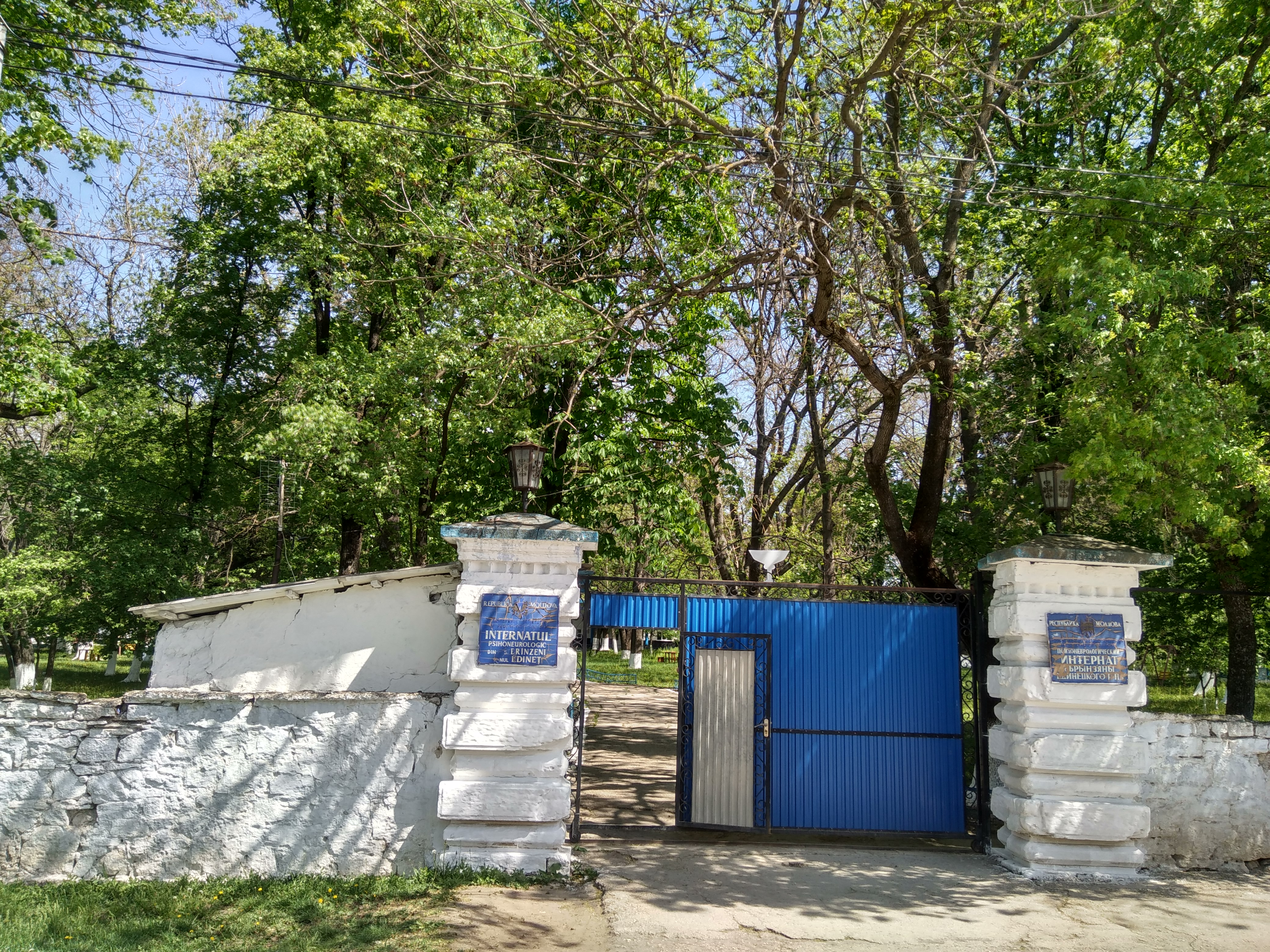 Parcul din satul Brînzeni, monument al naturii amplasat în raionul Edineț, satul Brînzeni (cod MD-ED-map-013)